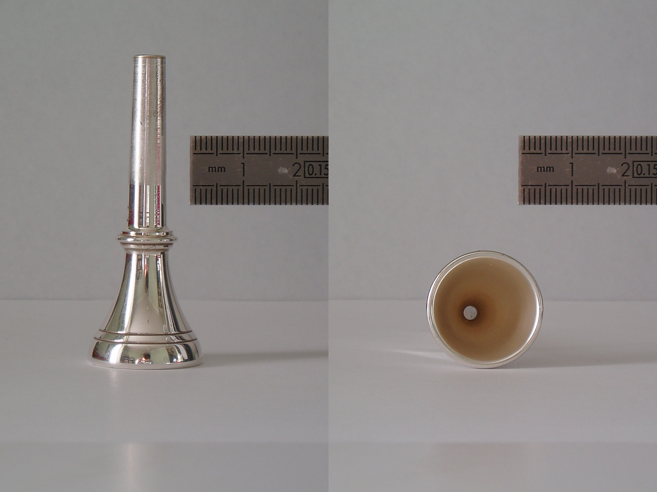 Hunting horn mouthpiece - Embouchure de trompe de chasse - Modèle 07 de Milliens